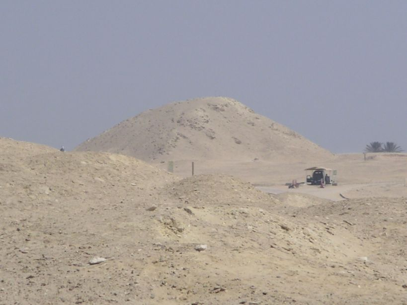 Vue de la pyramide de Téti à Saqqarah - VIe dynastie égyptienne